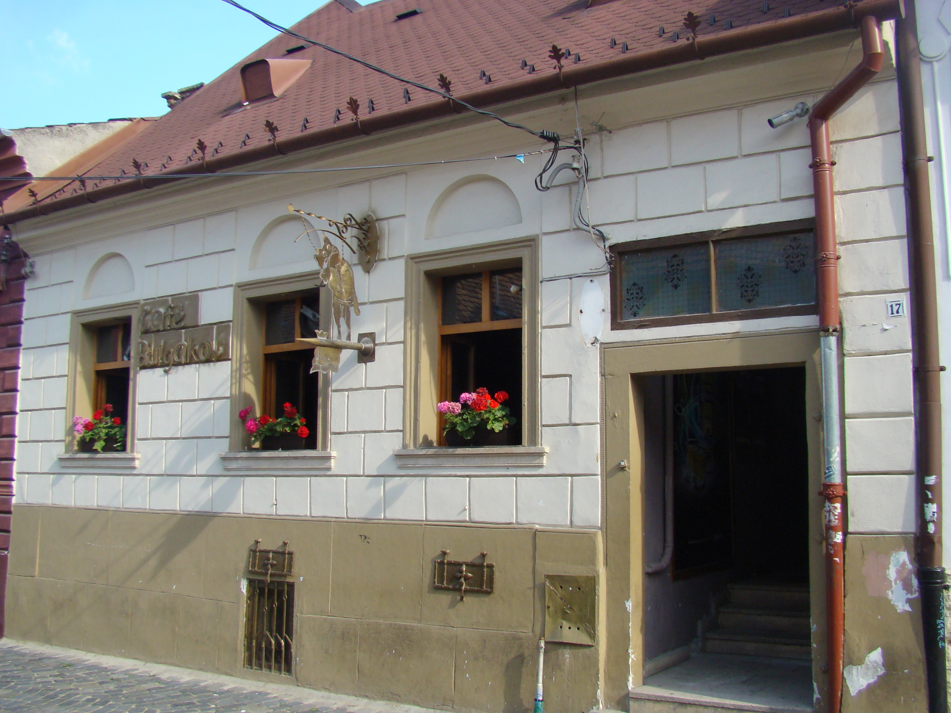 Clădire monument istoric, str. Inocențiu Micu-Klein, nr.17